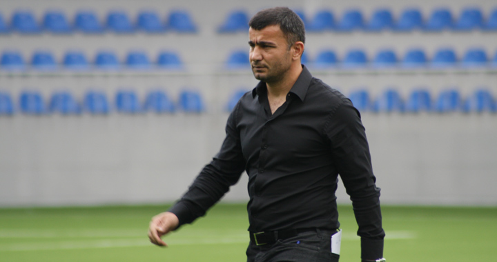 Qurban Qurbanov 1996/97 mövsümünün bombardiri